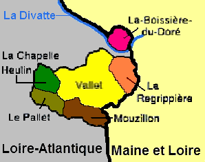 Carte de la Communauté de communes de Vallet.